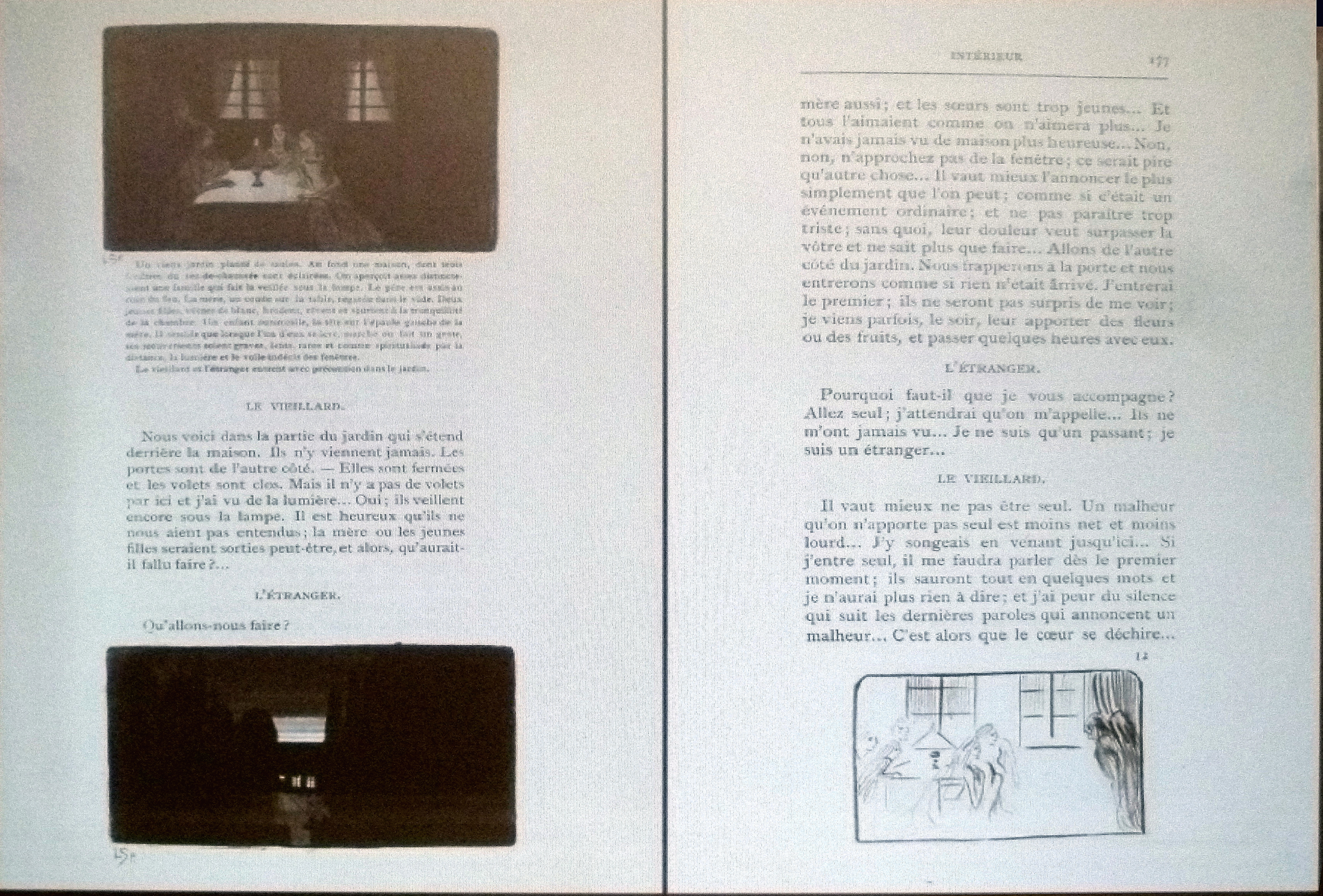 "Intérieur" , Théâtre (Maeterlinck); links : "De donkere woonkamer " + "Het huis in de verte"; rechts: "De helverlichte woonkamer"; illustraties door Léon Spilliaert (1903); privébezit